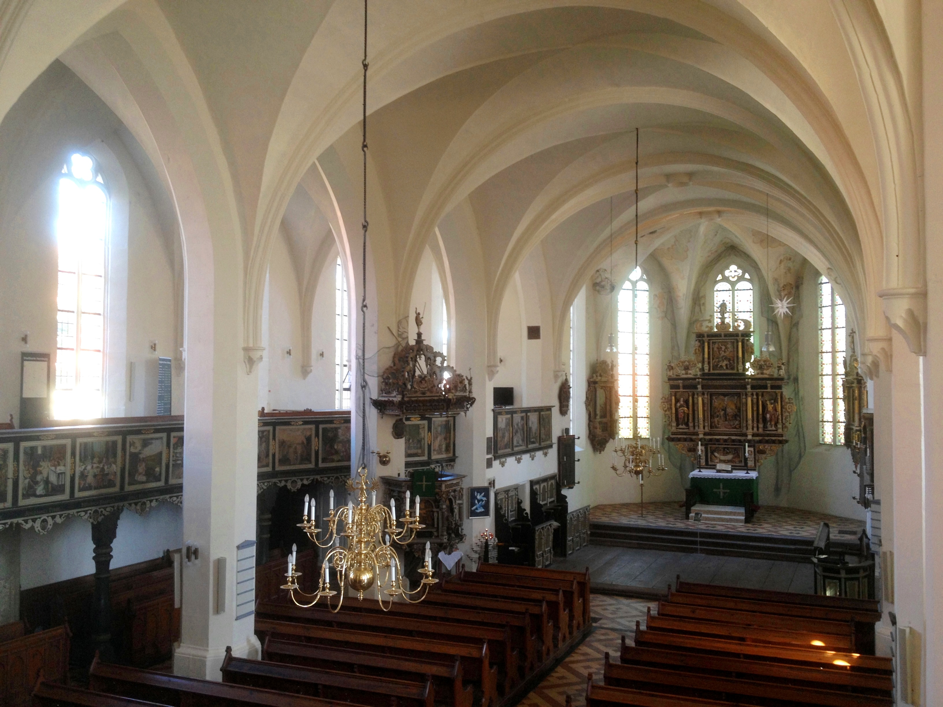 Hornburg, ev.-luth. Marienkirche